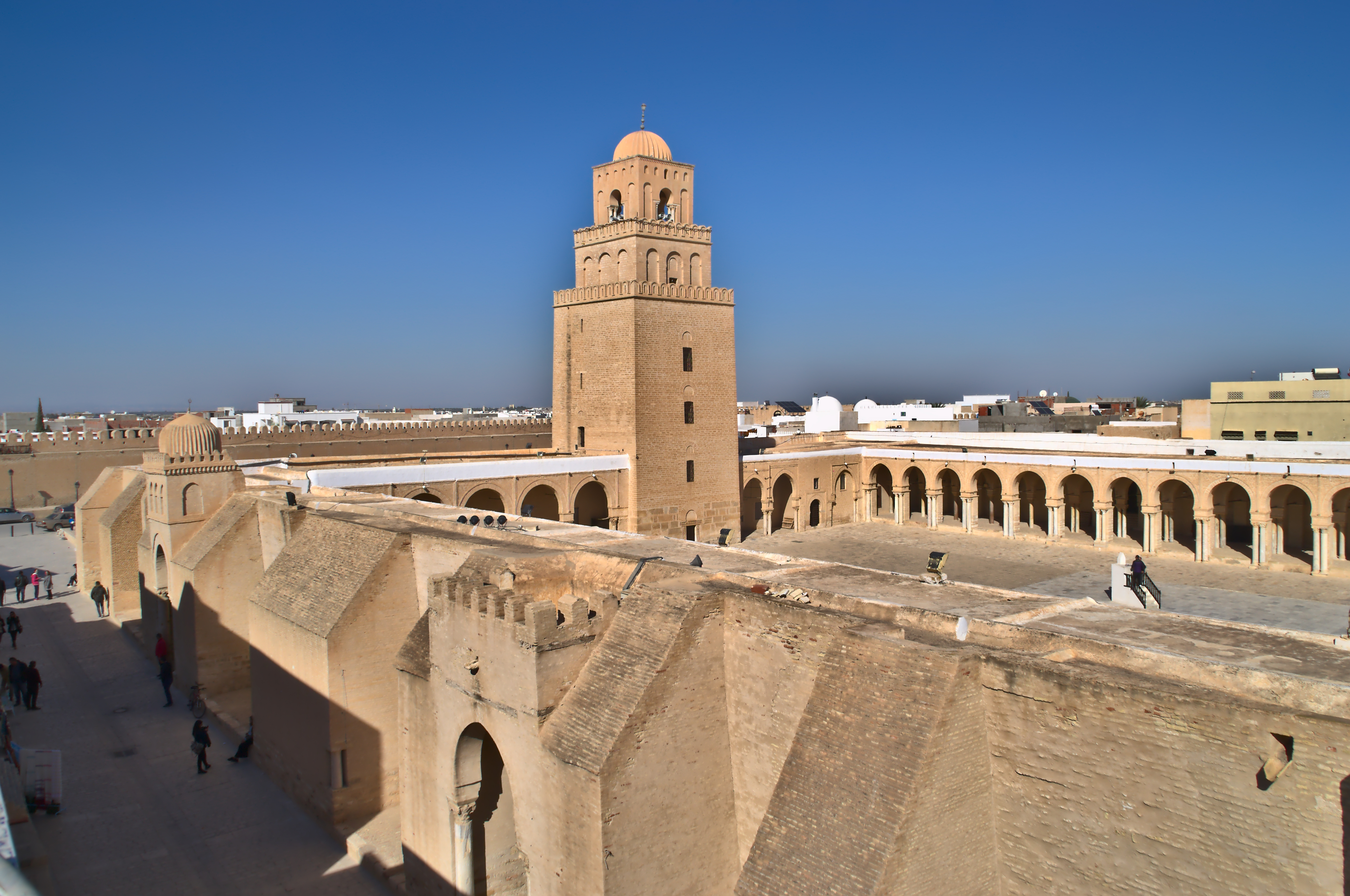 Monuments historiques de la ville de Kairouan de la Tunisie CC BY SA-User:Dyolf77